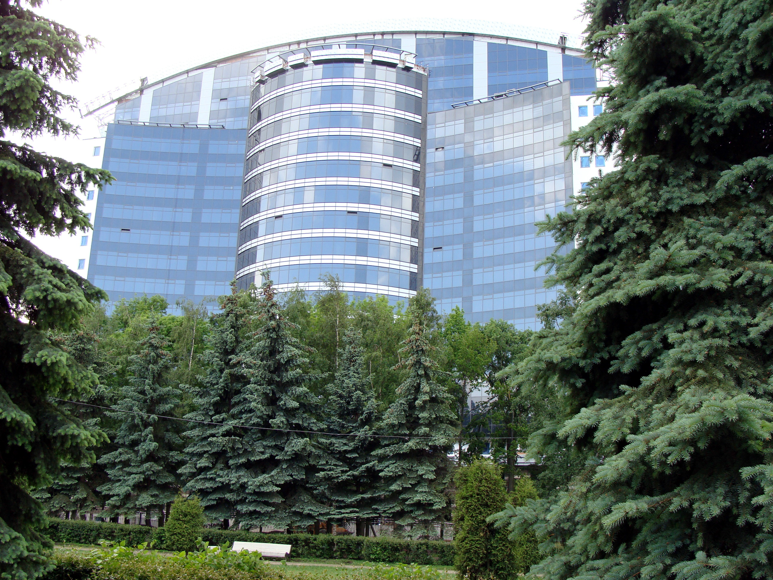 Биржа